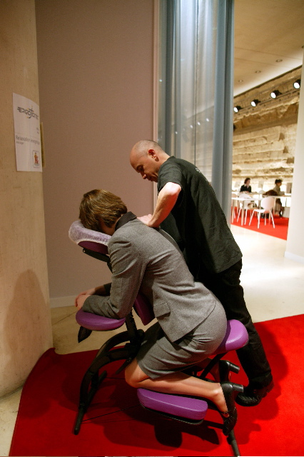 AMMA ASSIS - Massage sur seat